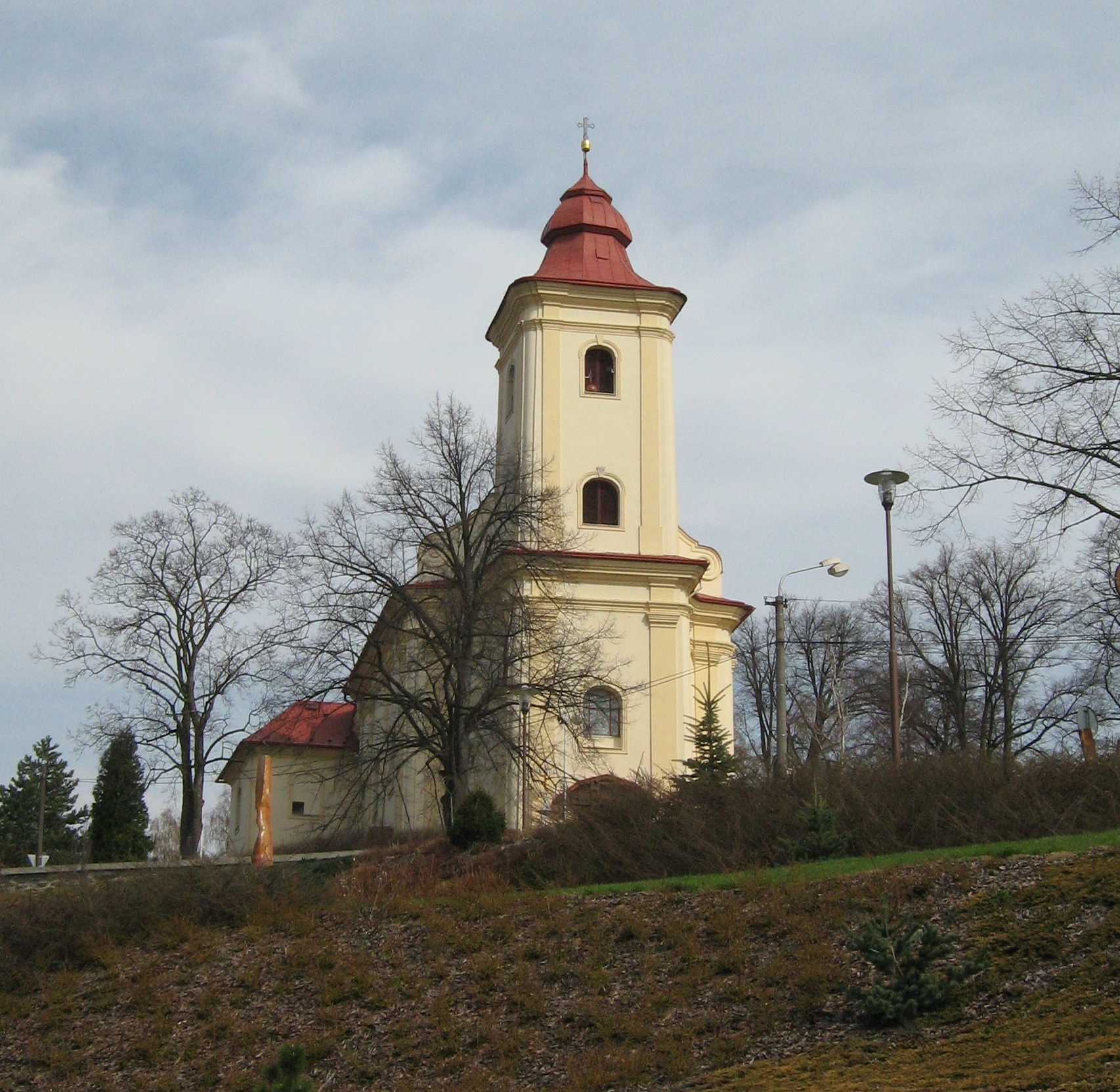 Kostel sv. Jakuba v Plesné